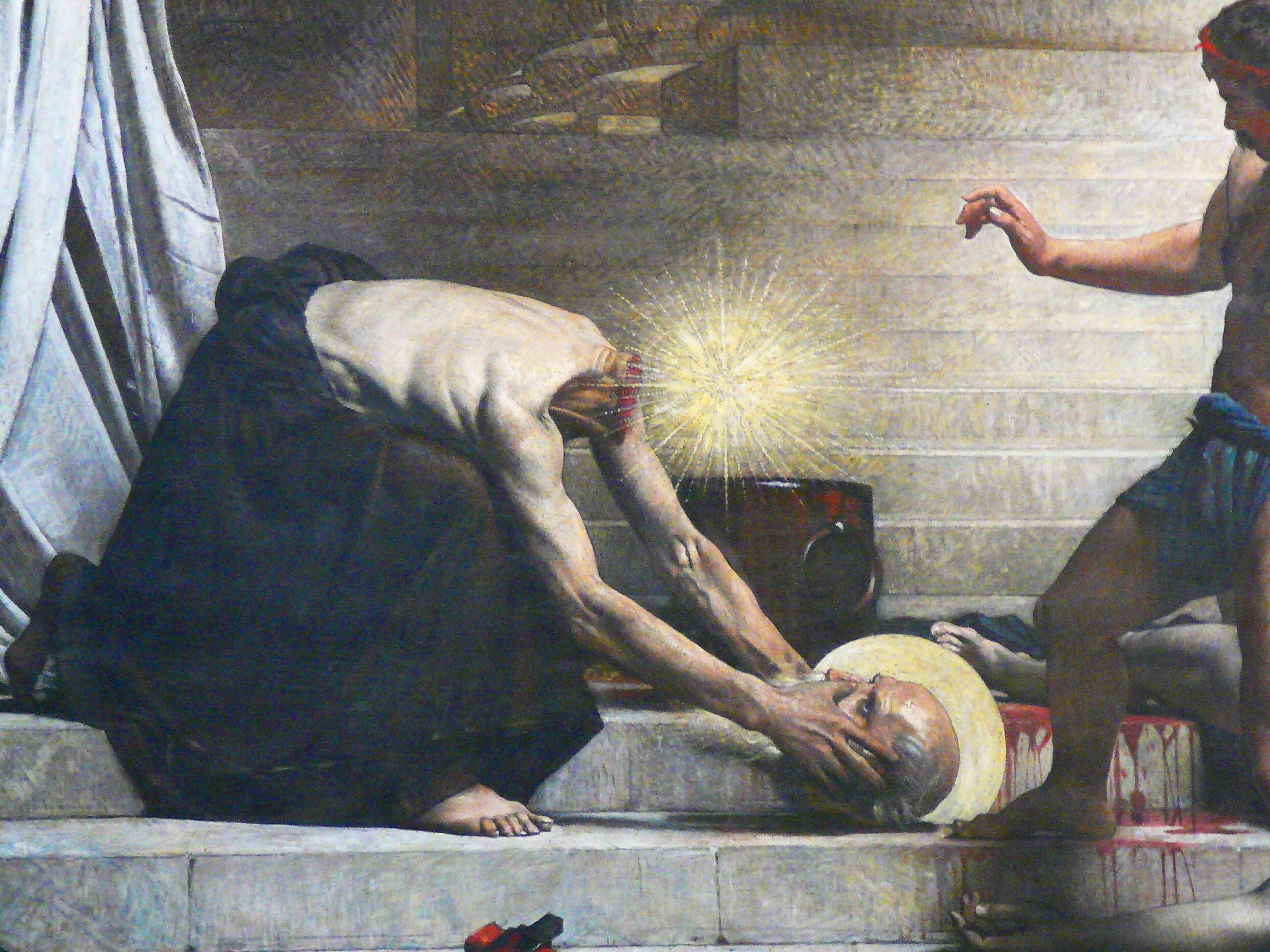 Paris, Panthéon, Wandgemälde Martyrium des hl. Dionysius, Ausschnitt